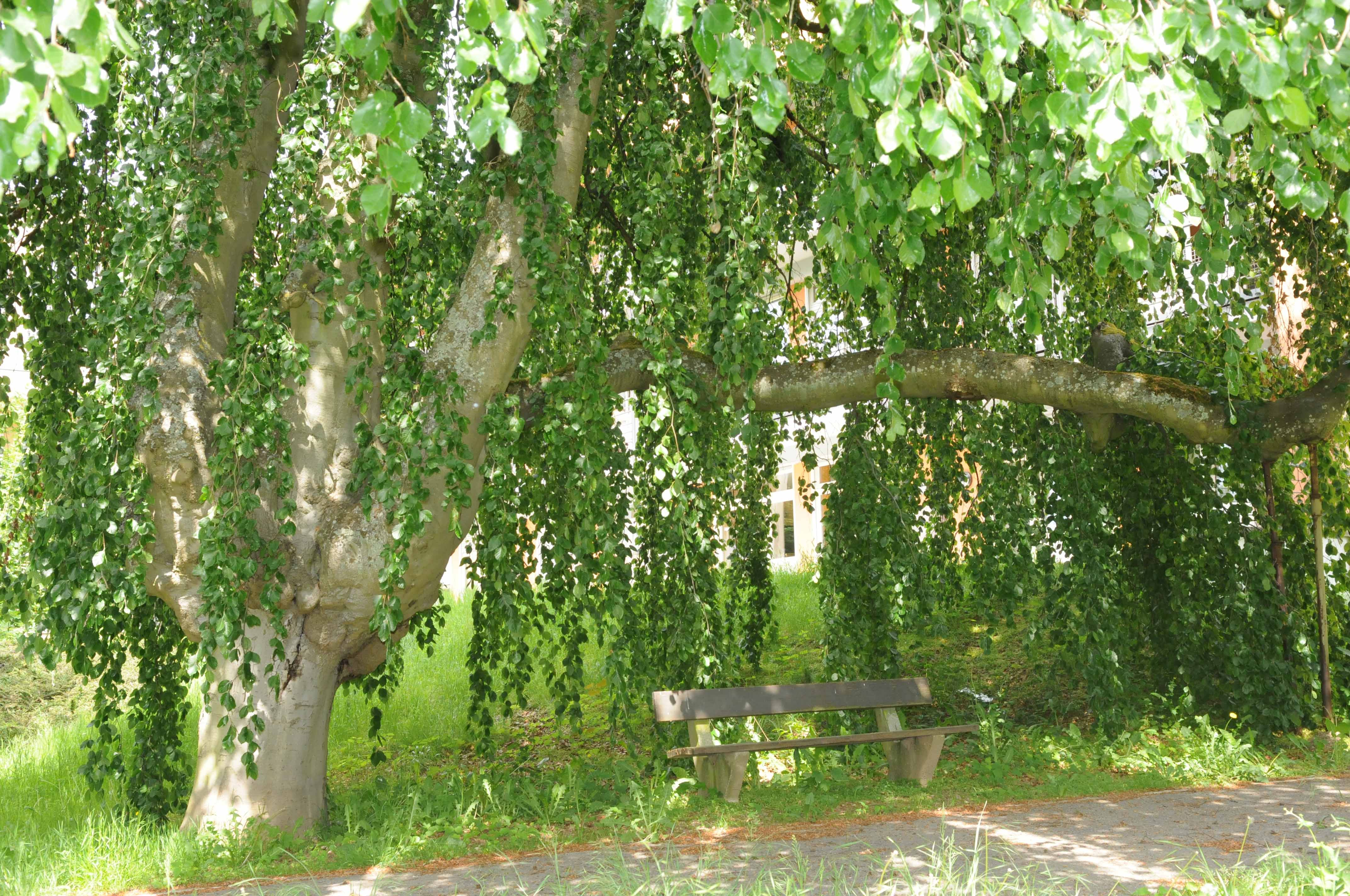 Trauerbuch zu Bouferdeng.